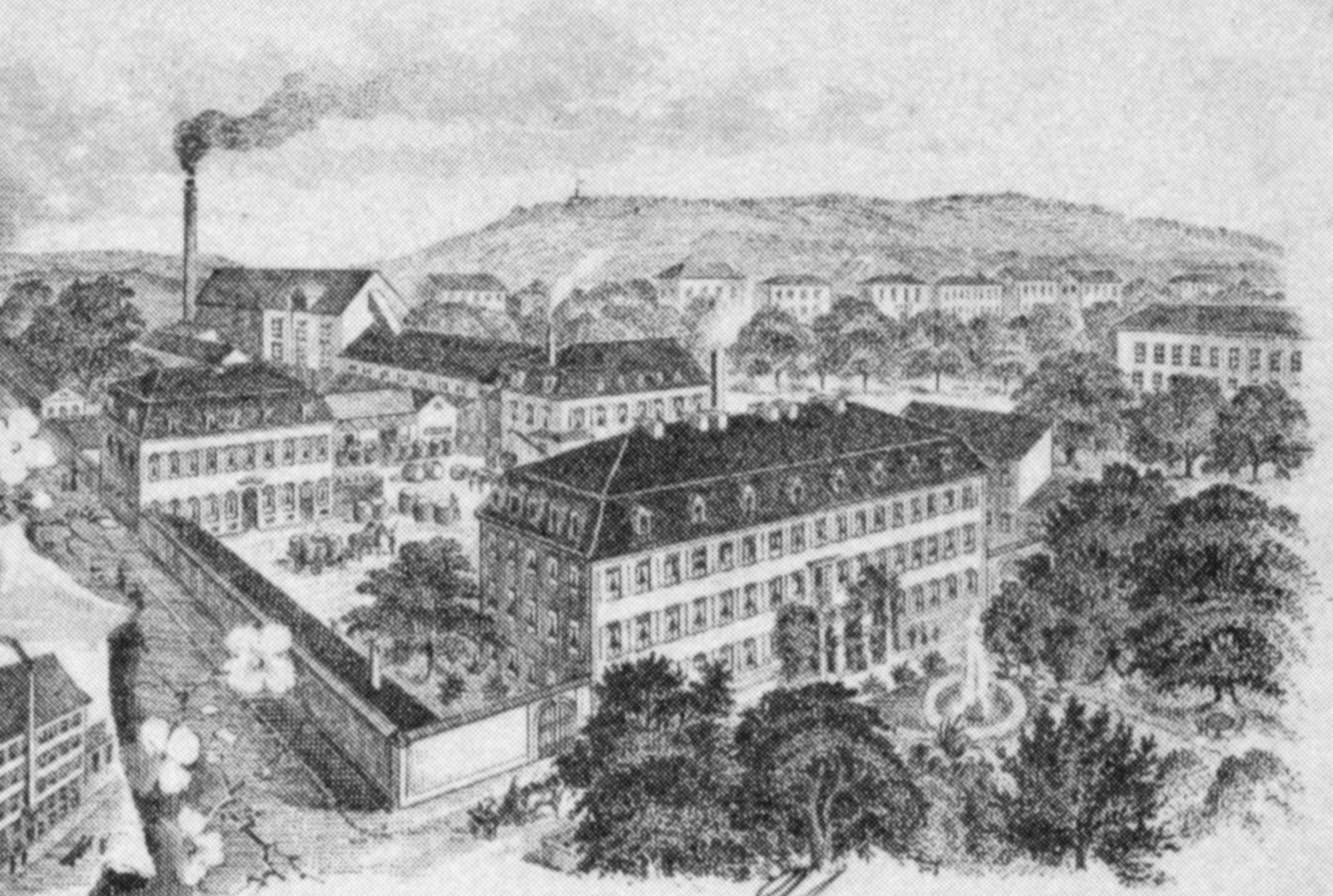 Bläß'sches Palais in Heilbronn, Detail einer Rechnung der Essig- und Bleiweißfabrik C. F. Bläß in Heilbronn 1902